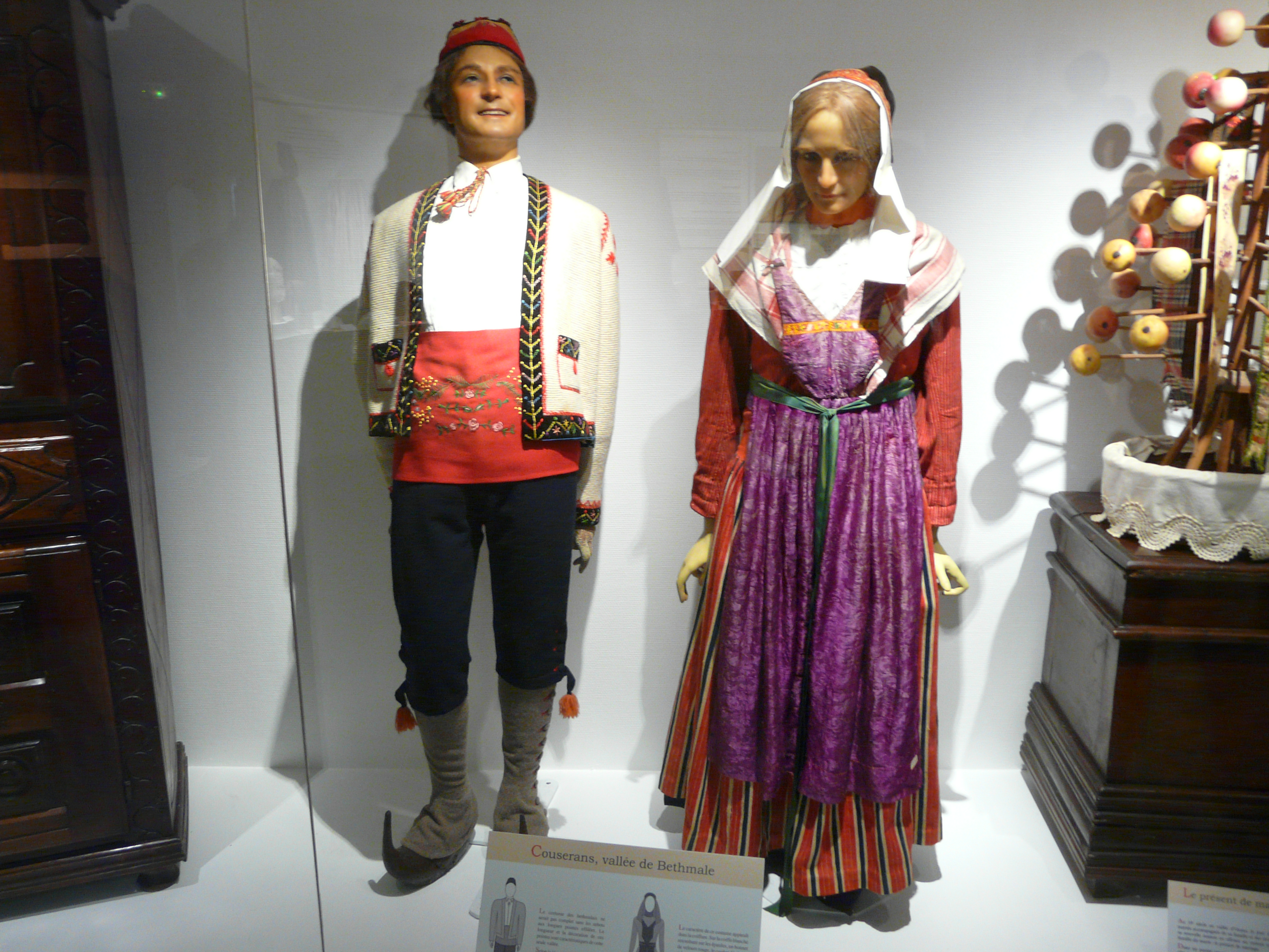 Costumes traditionnels ariégeois de la vallée de Bethmale ; musée pyrénéen, château fort de Lourdes, Hautes-Pyrénées, France.